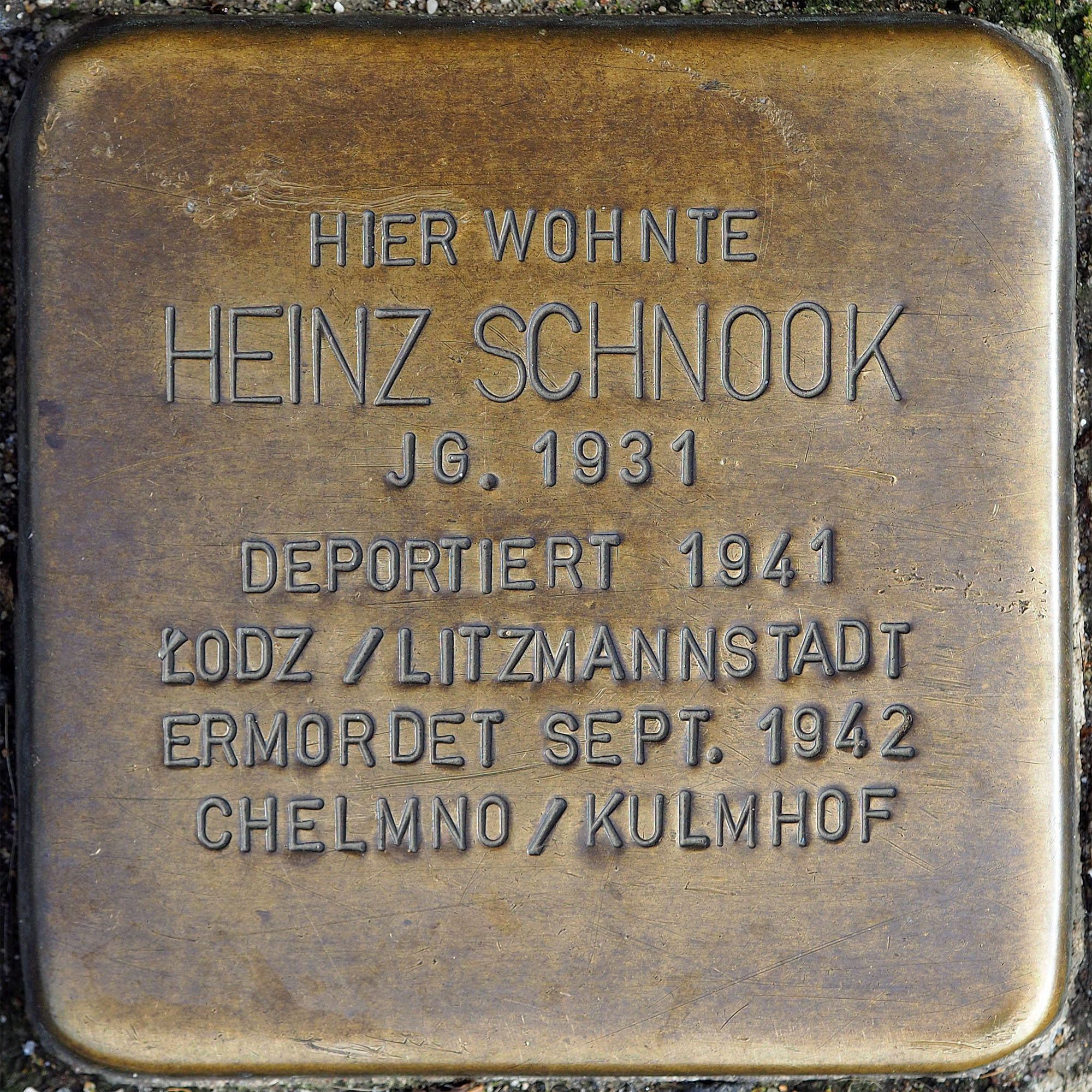 Stolpersteine MG: Schnook, Heinz